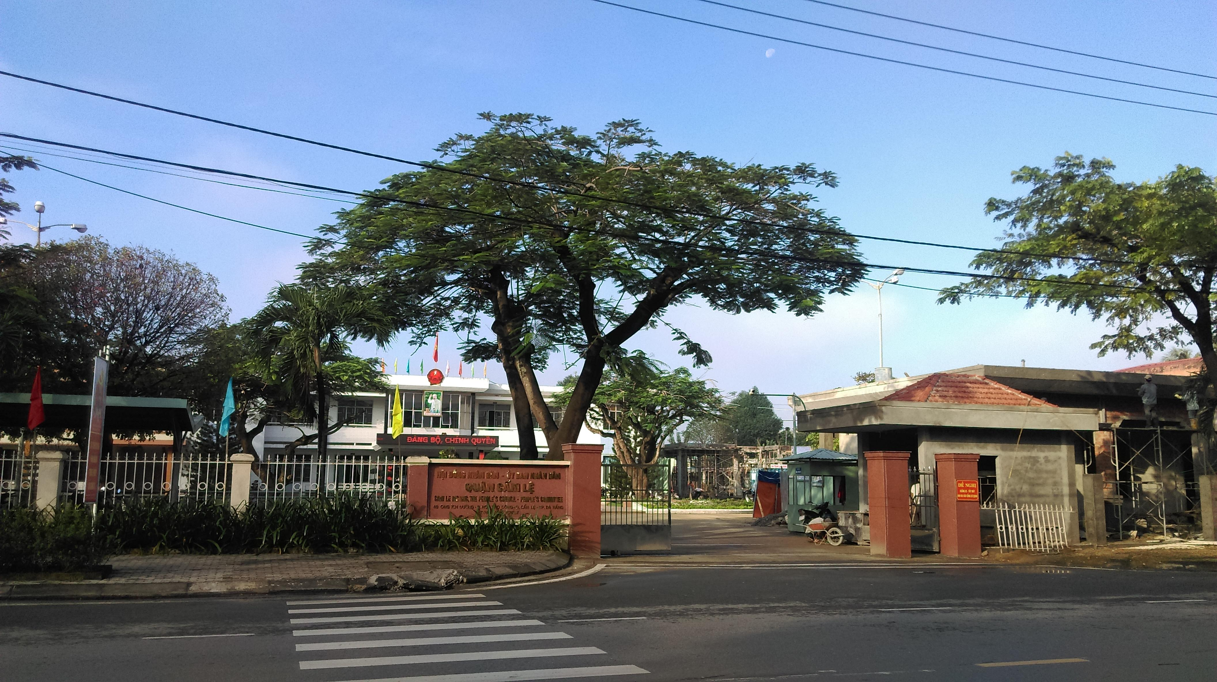 UBND quận Cẩm Lệ, Đà Nẵng